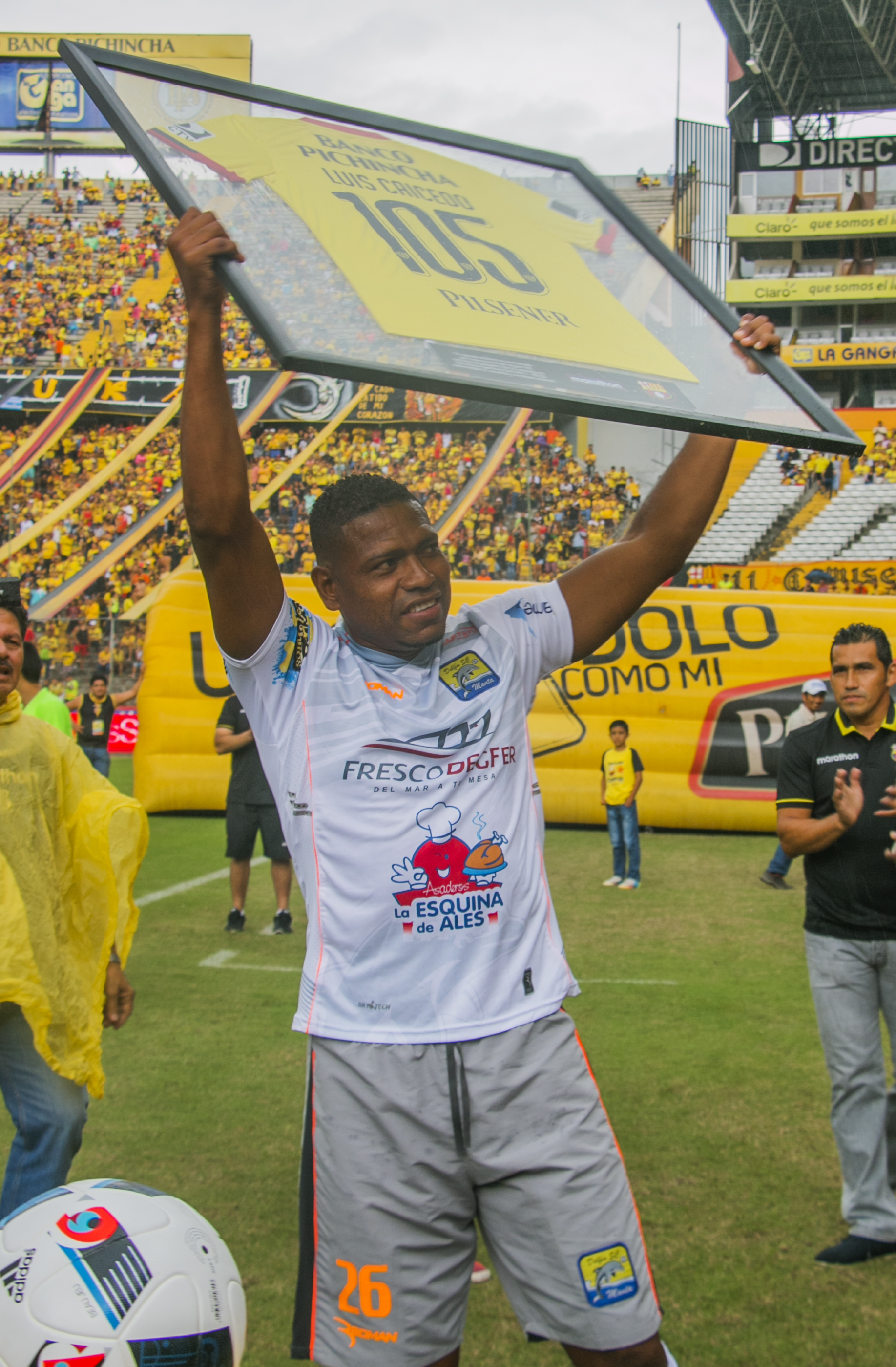 Luis Caicedo homenajeado por Barcelona jugando para Delfín SC en el año 2016